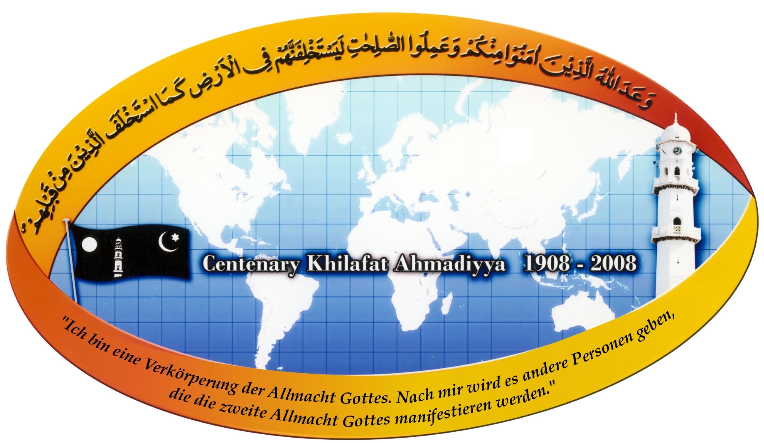 100-jähriges Khilafat Jubiläum Logo